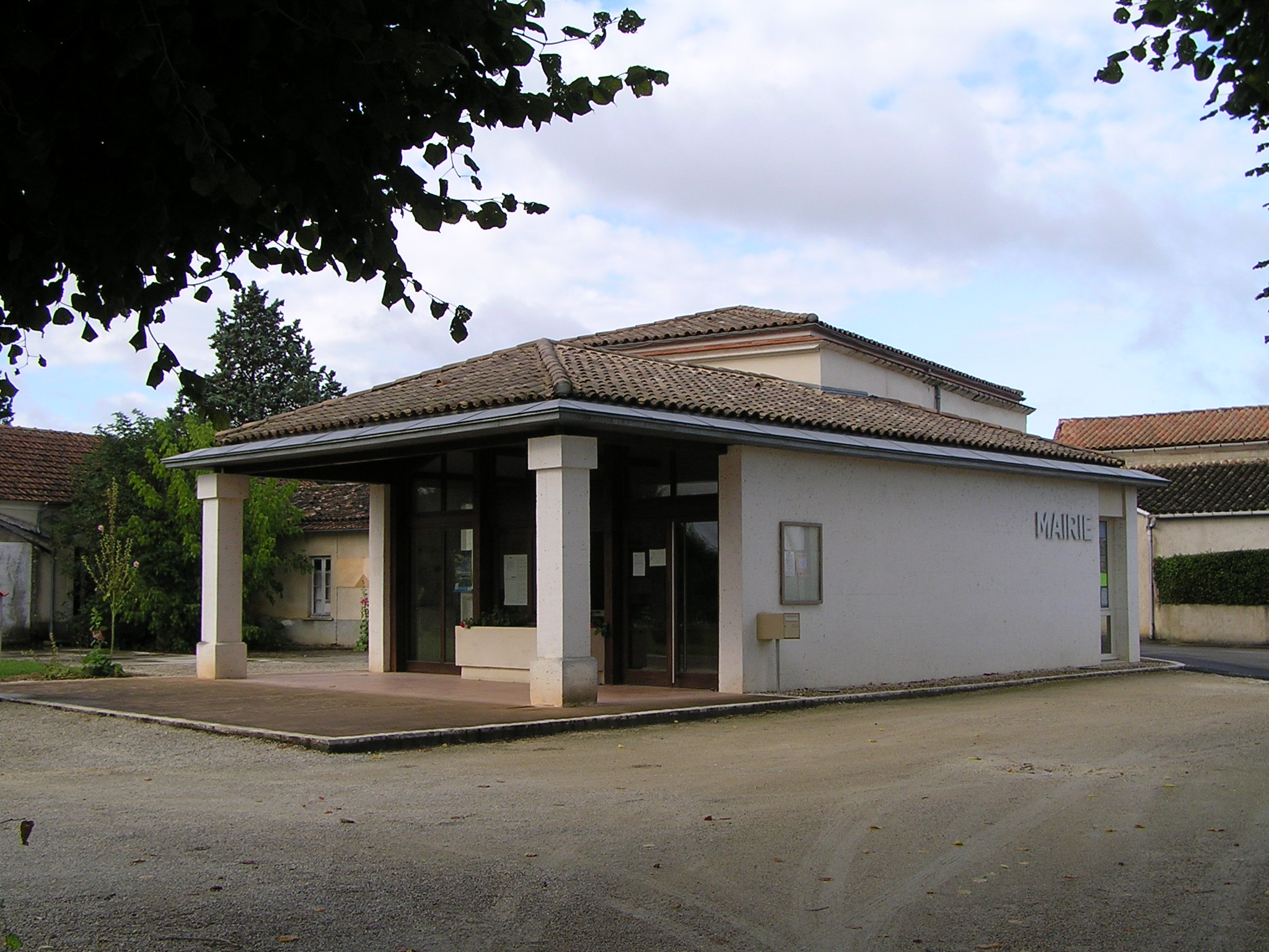 mairie d'Angeac-Charente